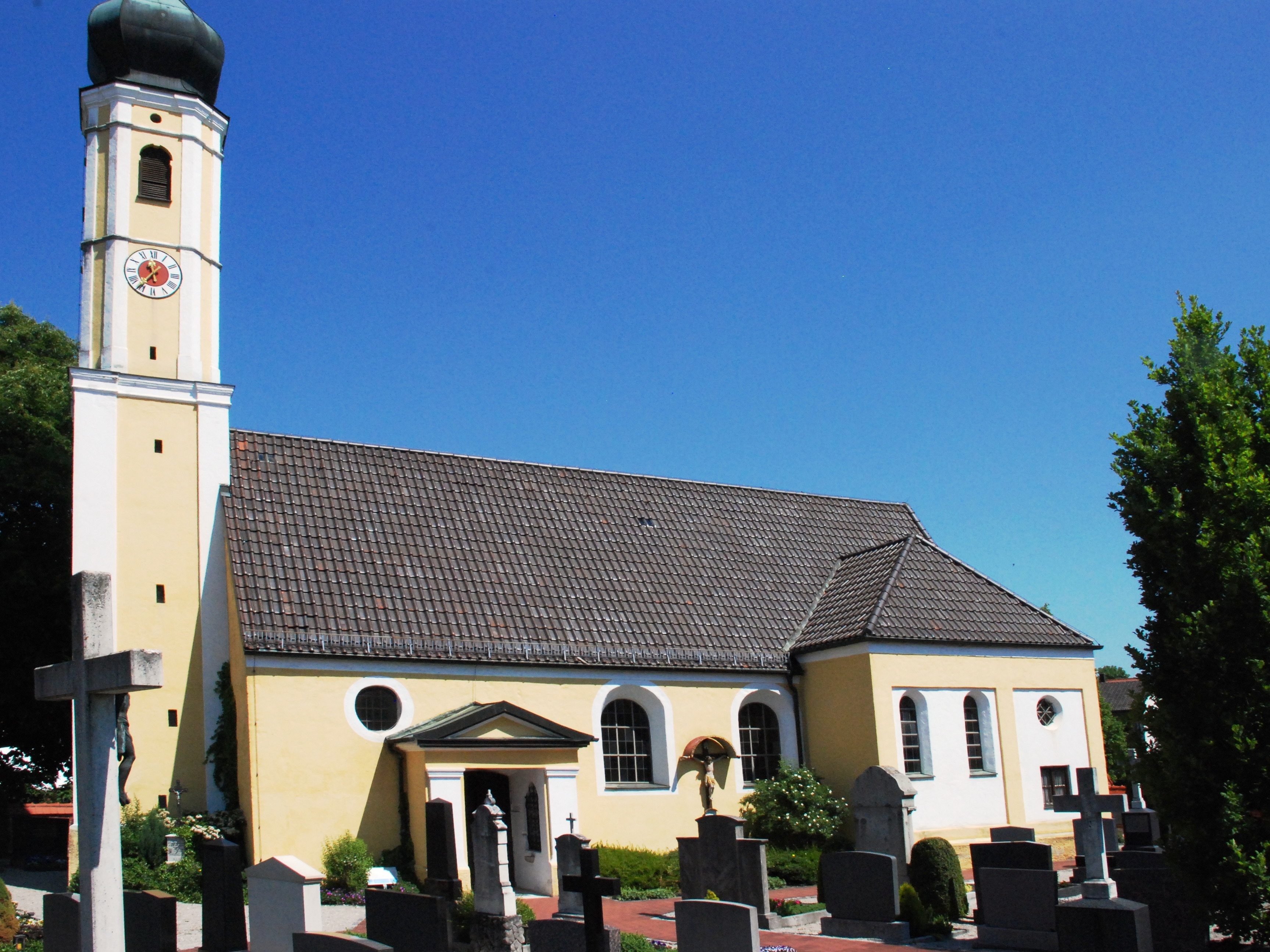 Denkmalgeschützte Kirche St. Ulrich in Unterschleißheim, Landkreis München (Bayerische Denkmalliste D-1-84-149-1)